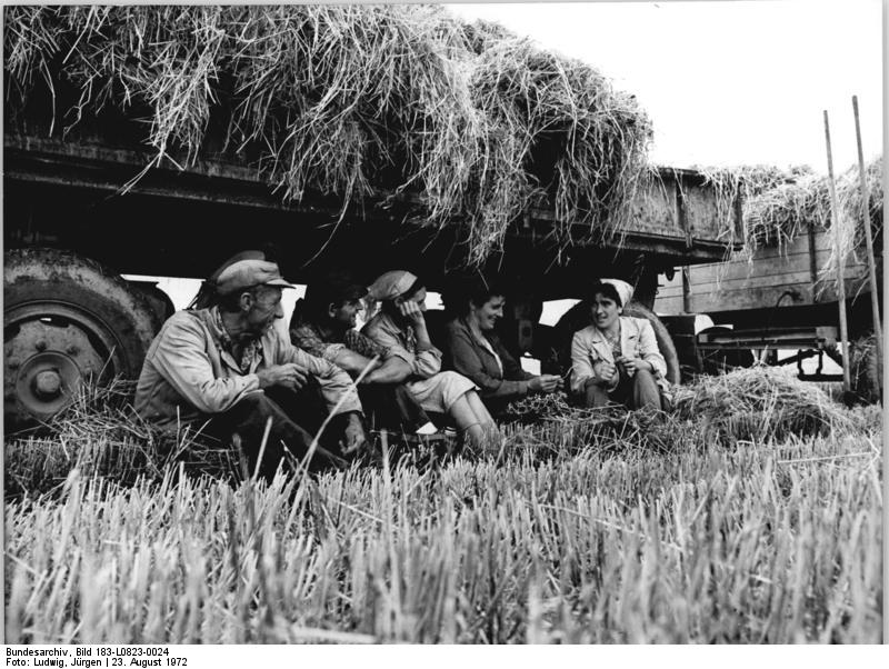 Erntearbeiter während eines Regenschauers ADN-ZB Ludwig-23.8.1972 die Genossenschaftsbauern der Kooperation "Wachsenburg" nutzen ihn im Schutze des Strohwagens zu einer Verschnaufpause und einem heiteren Gespräch.